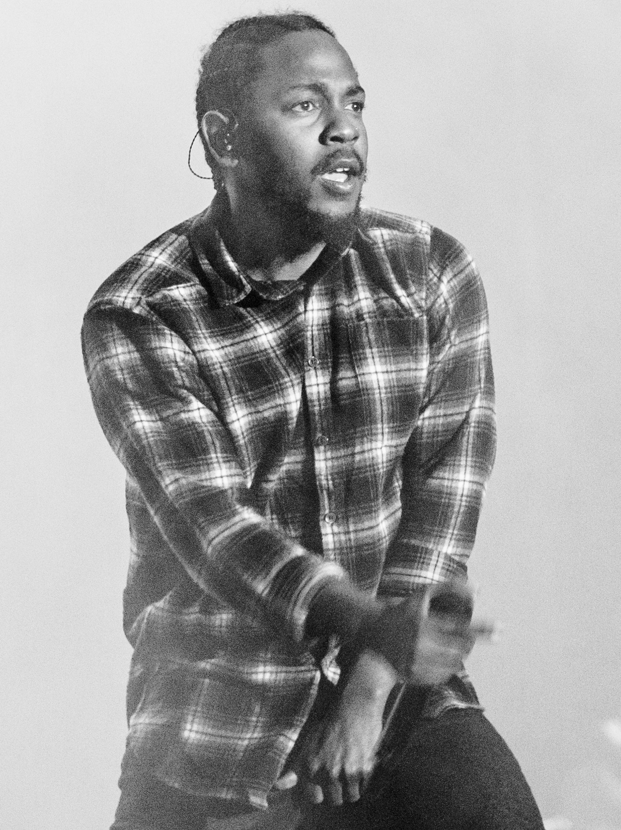 F.I.B. 2016